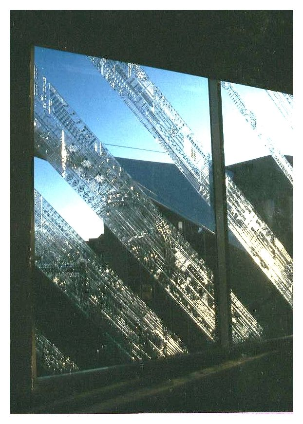 Carlo Roccella